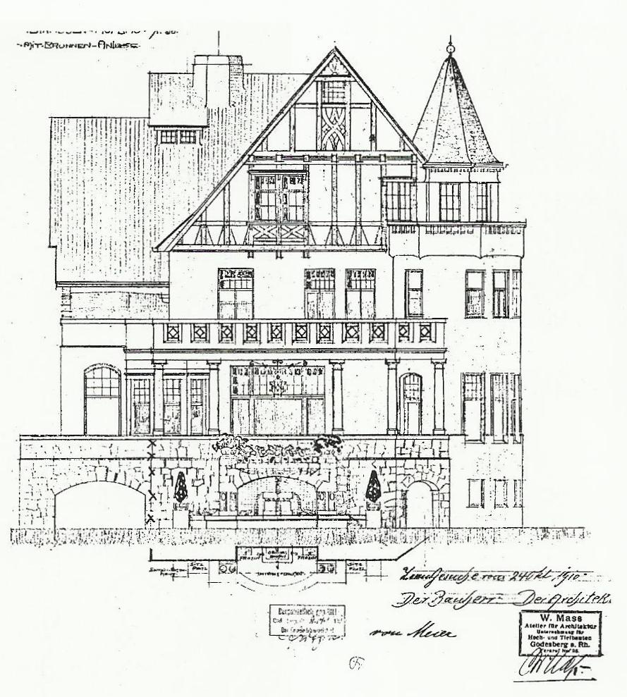 Villa von Meier, Bad Godesberg: Aufriss der Rheinfront (Baugesuch zur Umänderung der Terrasse) nach W. Mahs 1910